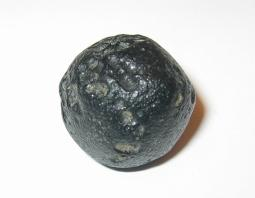 Tektit